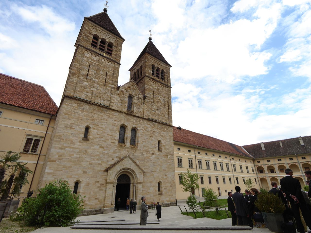 Abtei Seckau